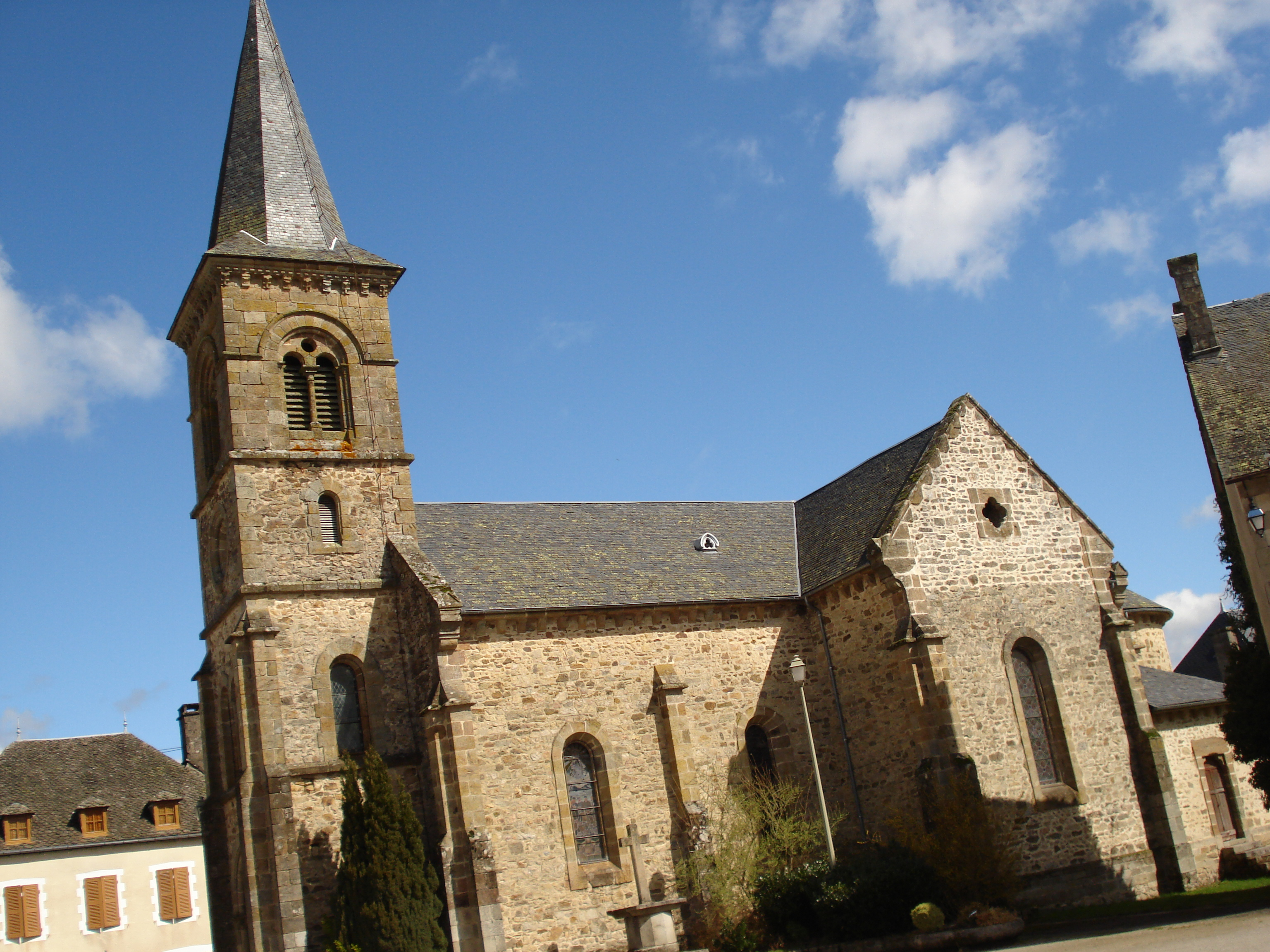 L'église St-Etienne de Lapleau, Lapleau, Corrèze, France